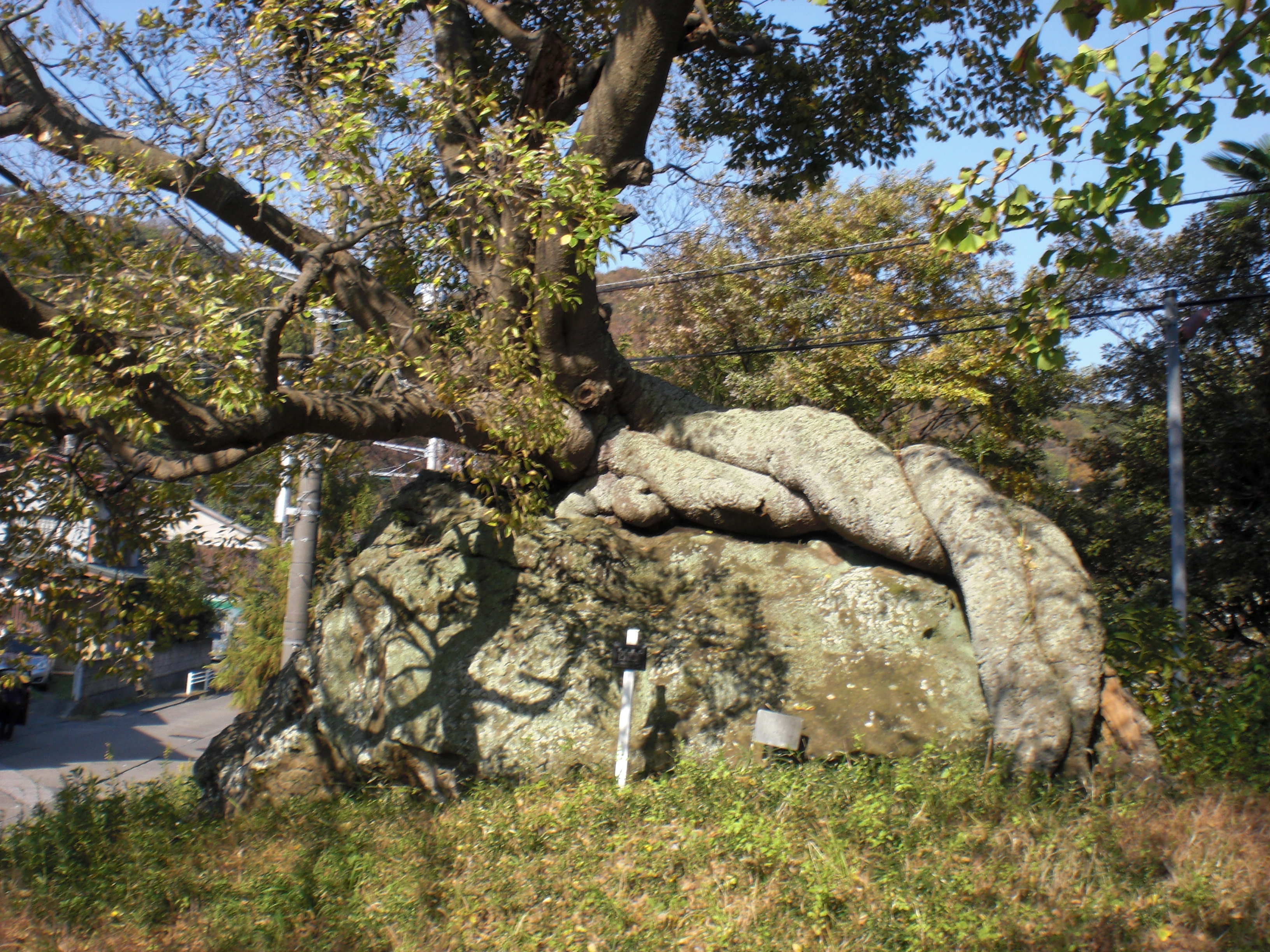 「石抱きの榎」神奈川県逗子市池子の福富稲荷社境内